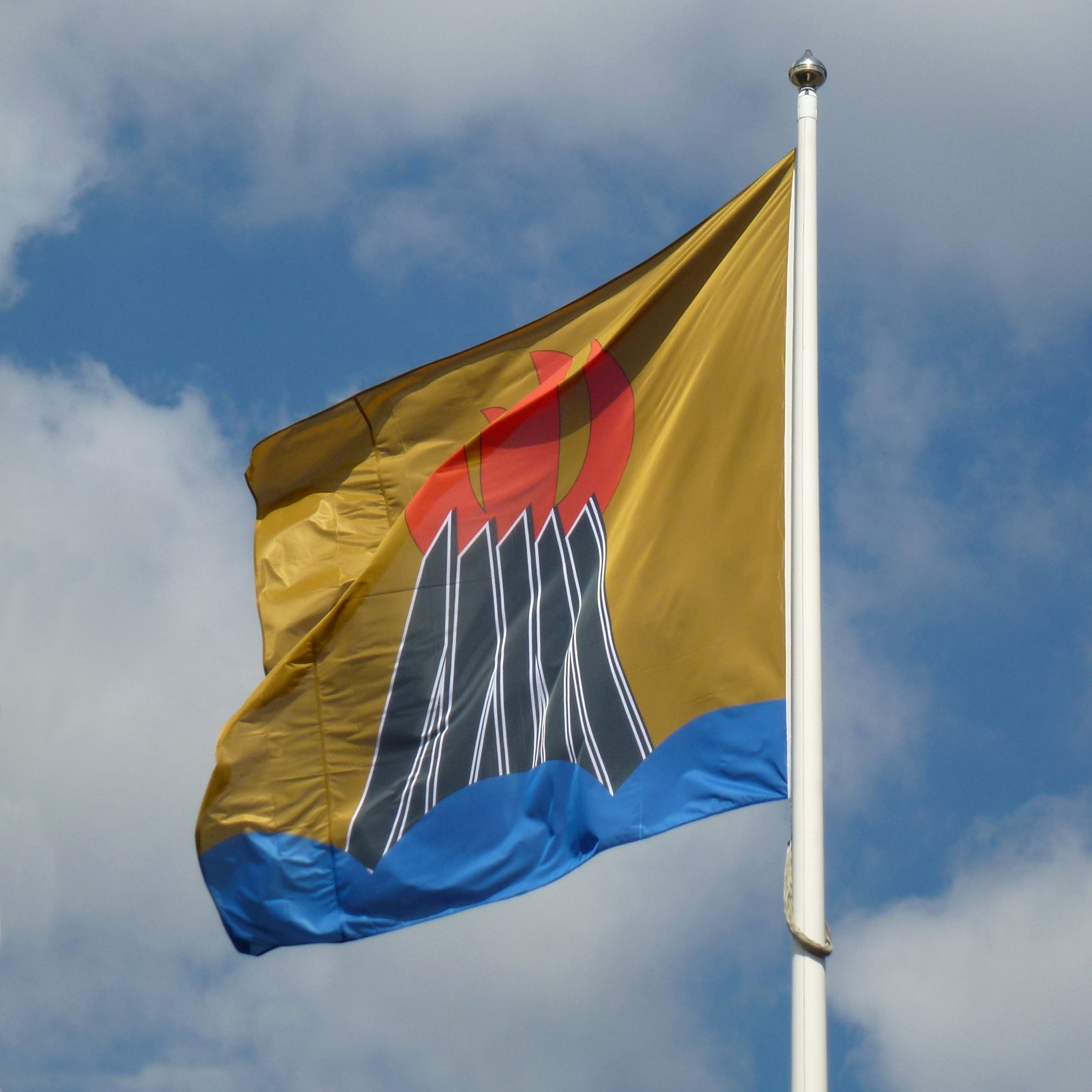 Huddinge kommuns flagga